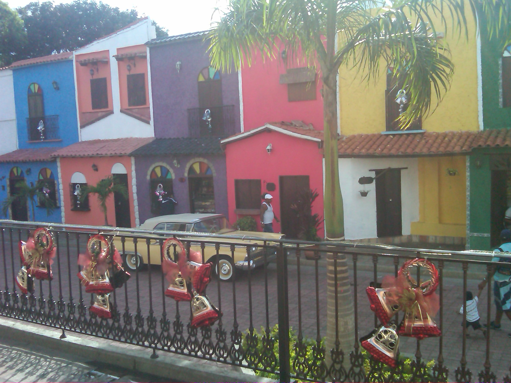 Paisaje Colonial en La Plaza Mayor de Catia La Mar, estado Vargas, Venezuela